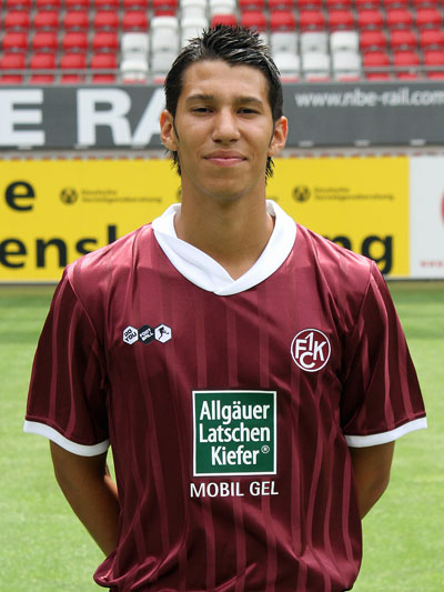 Marcel Correia, Fußballspieler